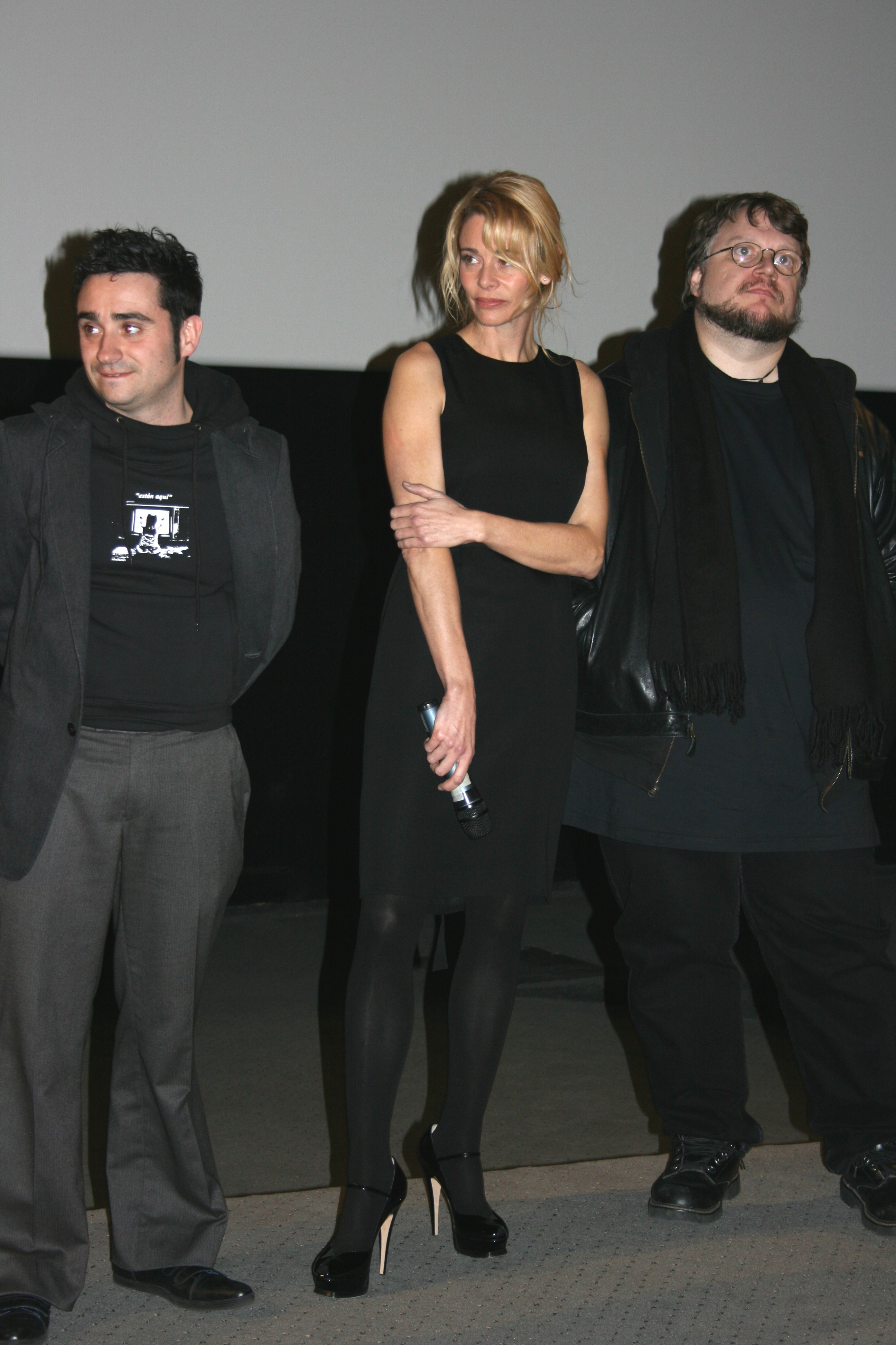 Juan Antonio Bayona, Belén Rueda et Guillermo del Toro à l'avant-première de L'Orphelinat diffusée à l'UGC Ciné Cité Les Halles, à Paris.